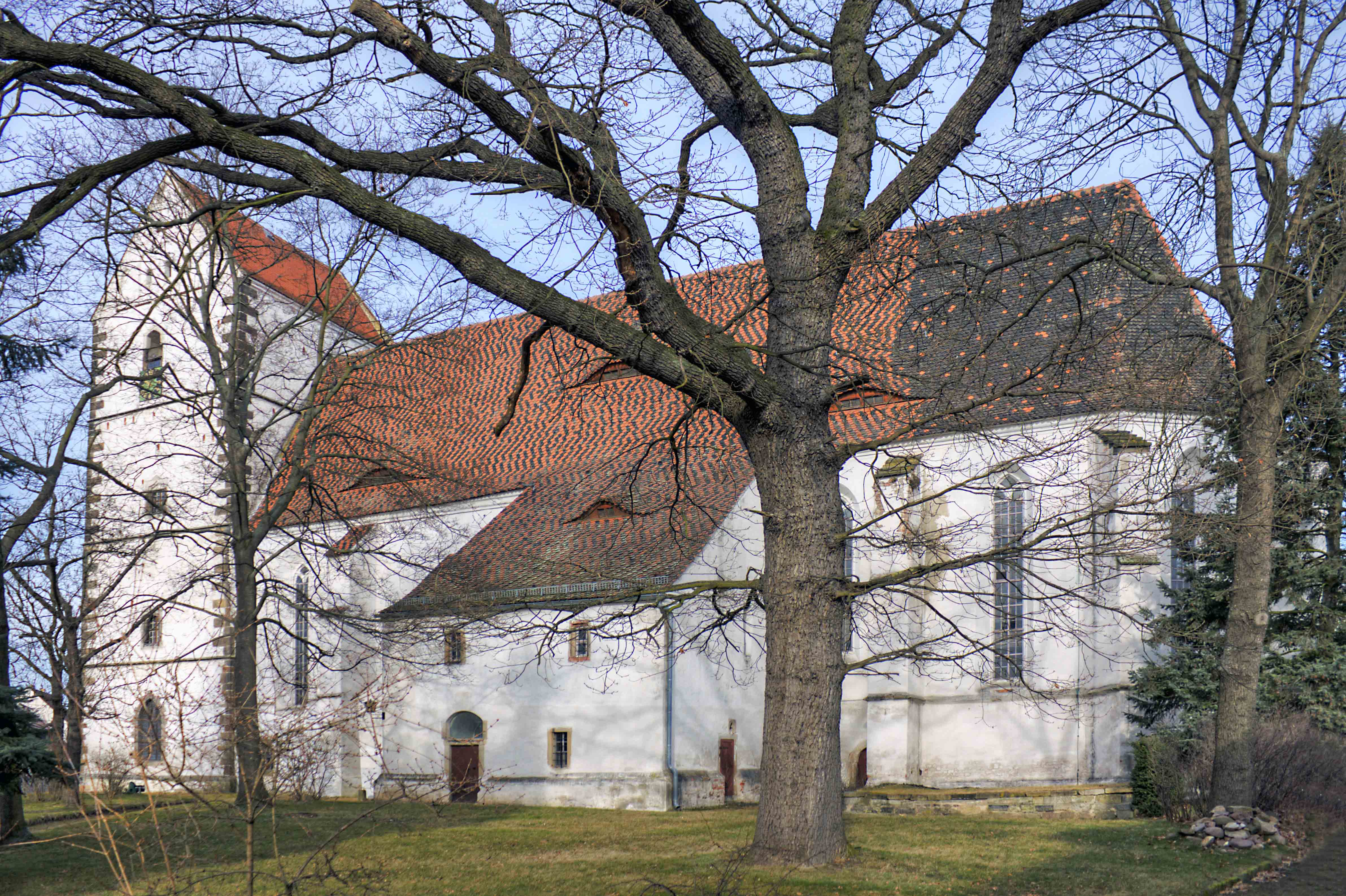 Kirche Sankt Bartholomäus, Kirchstraße 11 in Belgern-Schildau OT Belgern